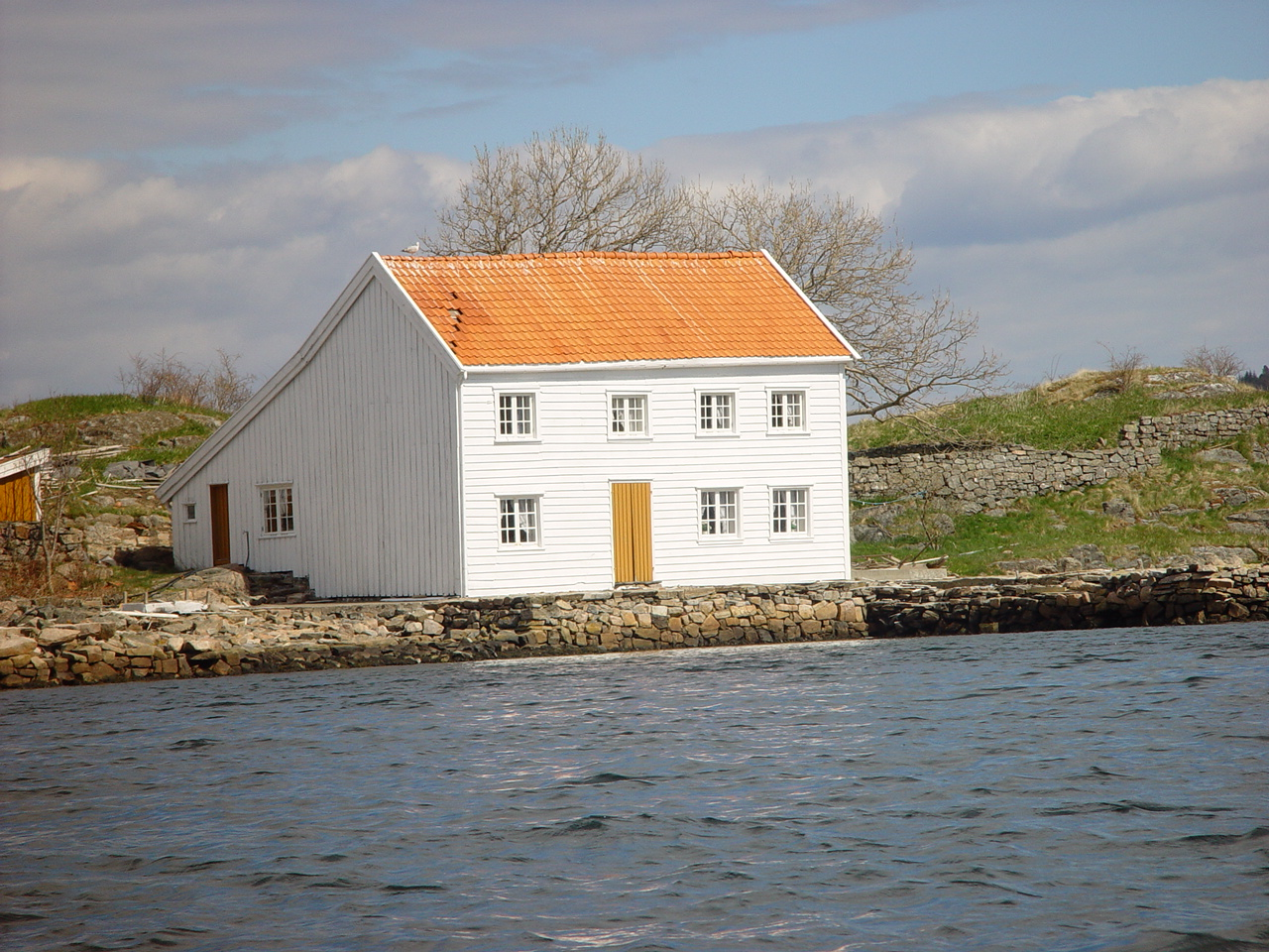 Svinør